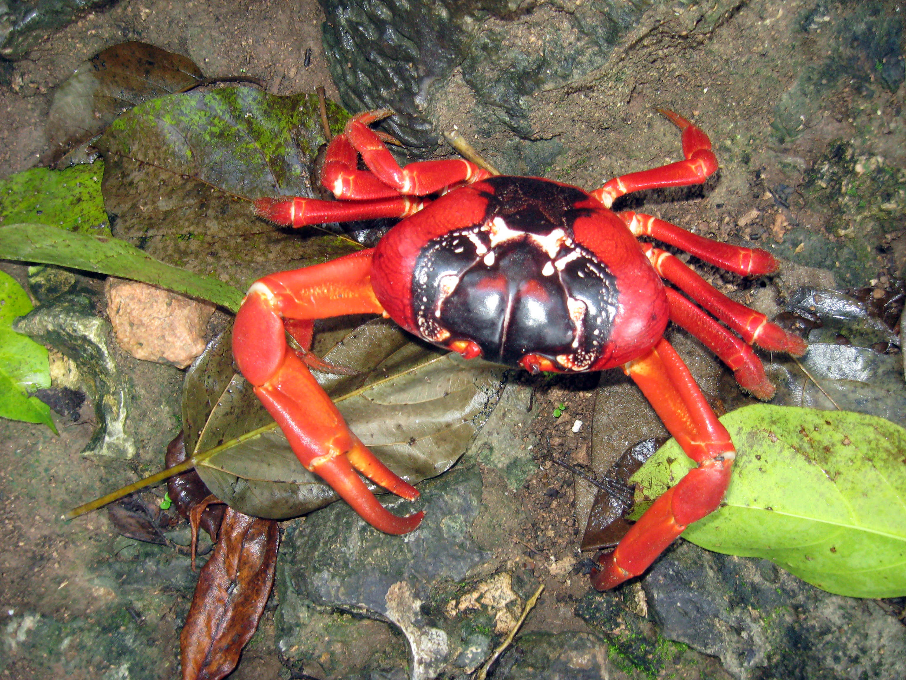 Gecarcoidea natalis auf Christmas Island (Indian Ocean)